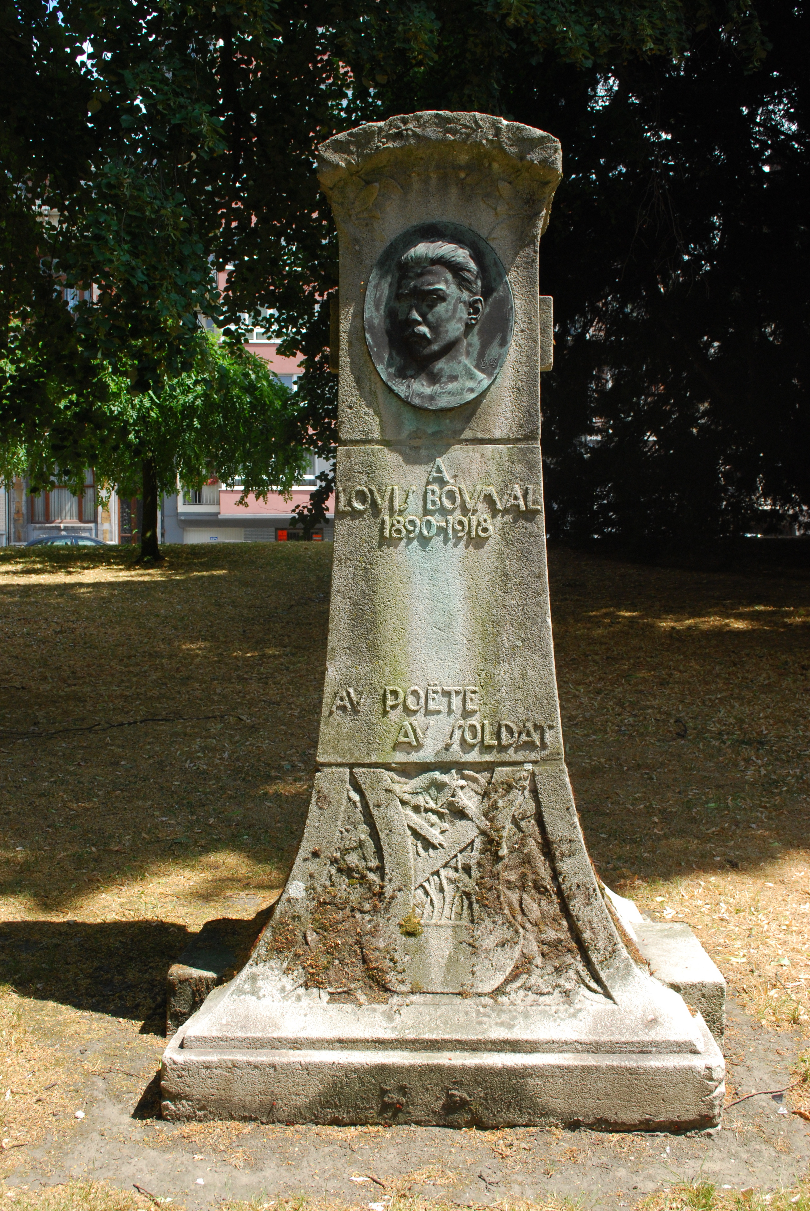 Monument à Louis Boumal dans le parc de la Boverie à Liège.